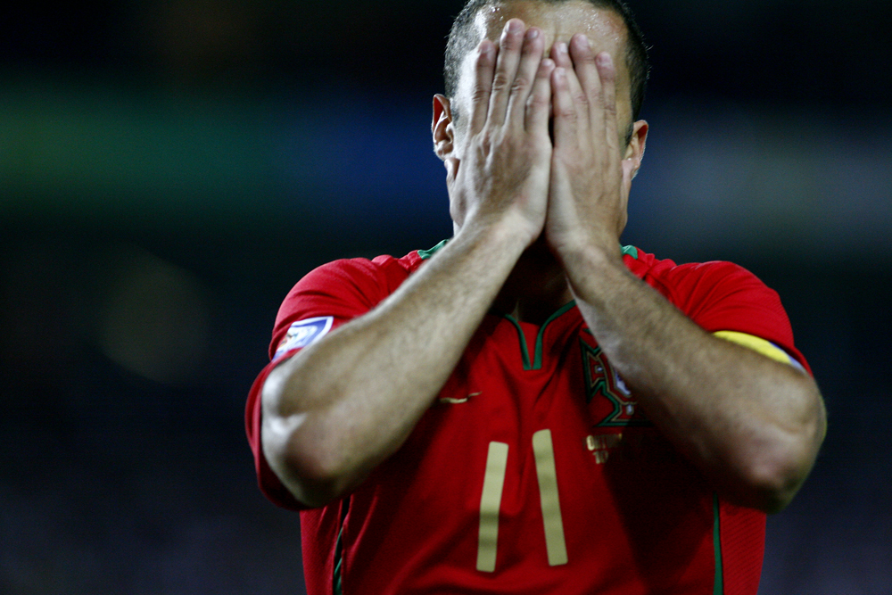 Simão (11); Portugal 2-3 Denmark, Lisbon September 10 2008